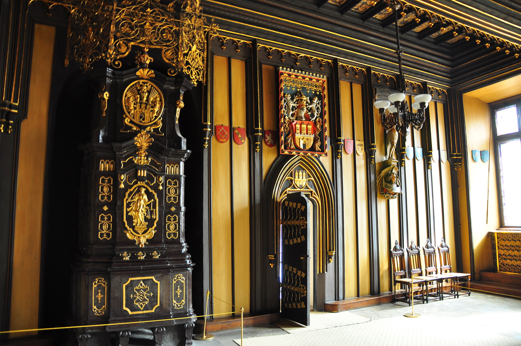 Interiér staroměstské radnice v Praze, malý sál